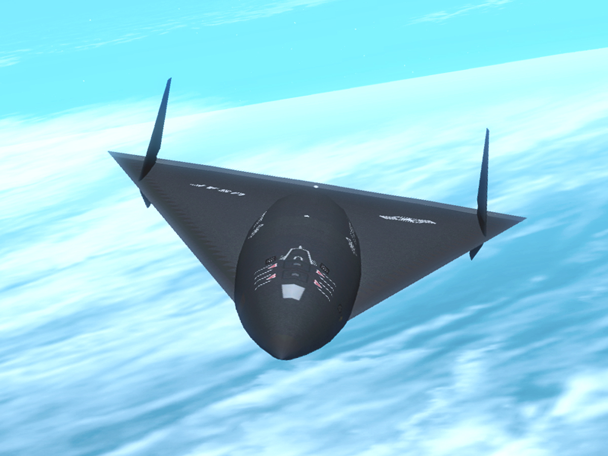 SR-91 Aurora in X-Plane 8.60